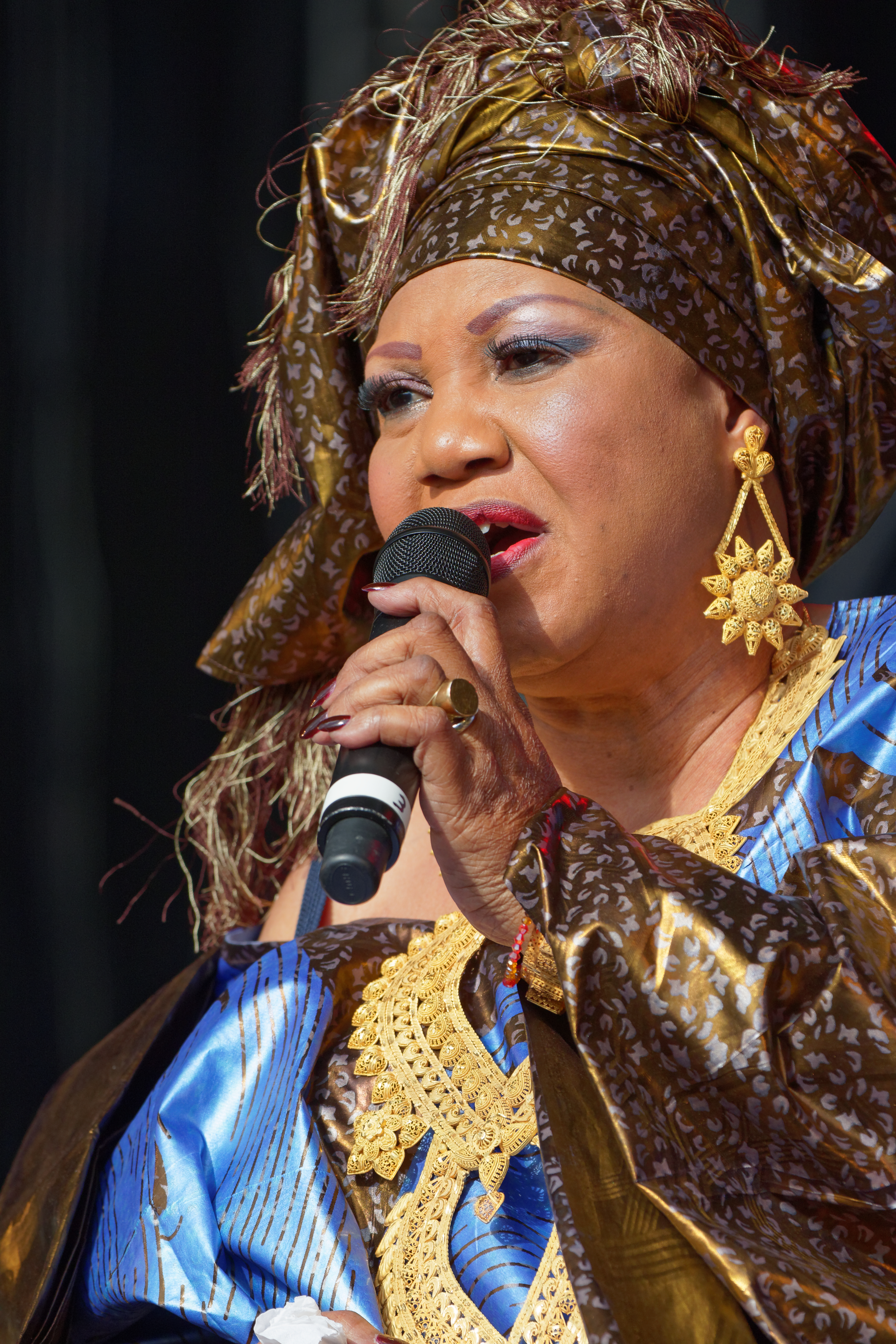 Les Amazones d'Afrique en concert sur la scène Landaoudec lors du festival du Bout du Monde 2016 à Crozon dans le Finistère (France).